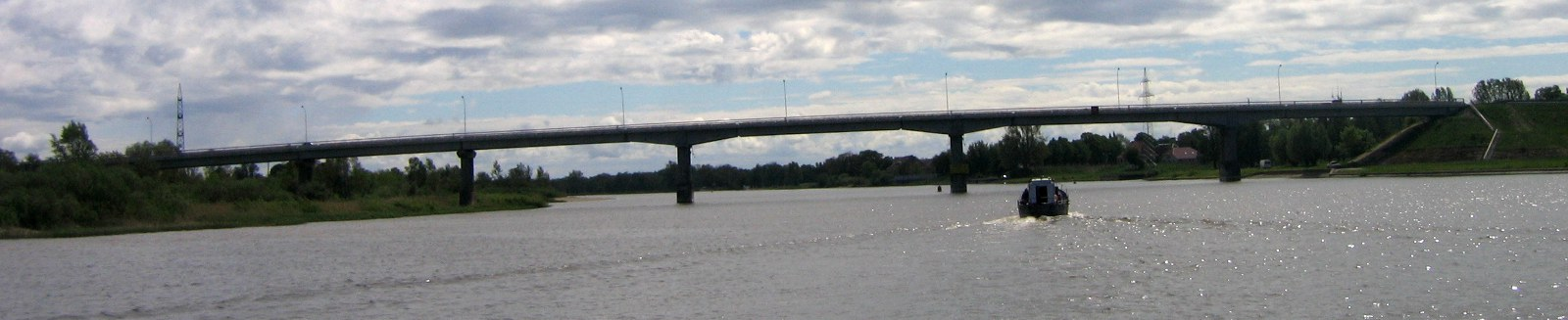 Autoriaus nuotrauka, 2006.05.27. Tiltas per Atmatą į Rusnę. Nuotrauka gali būti platinama pagal GFDL licenciją.